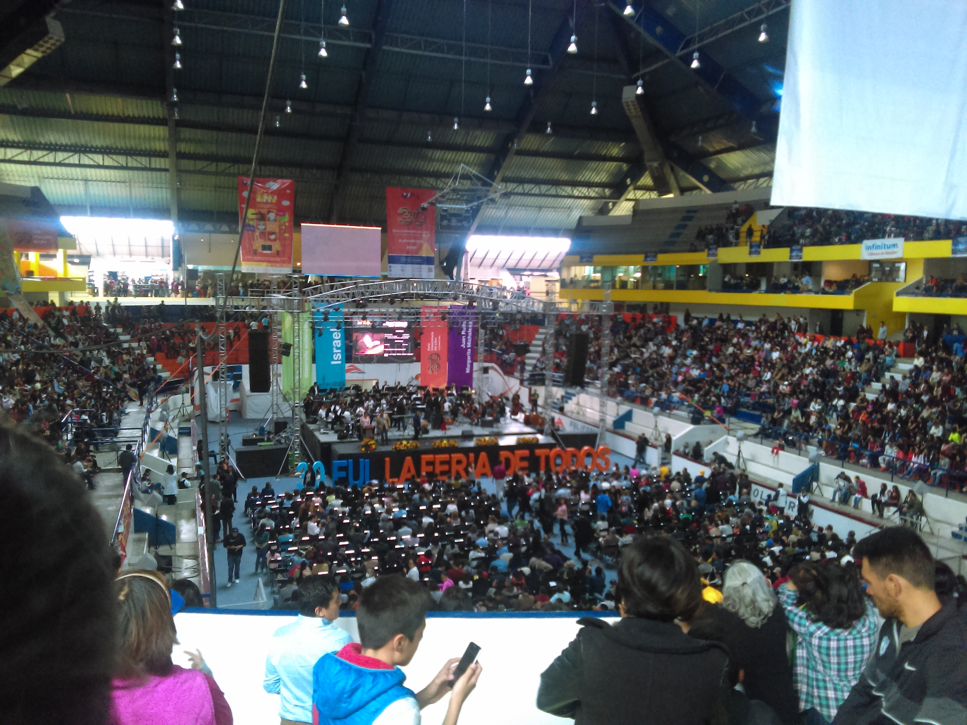 Feria Universitaria del Libro (FUL) de la Universidad Autónoma del Estado de Hidalgo edición 2017